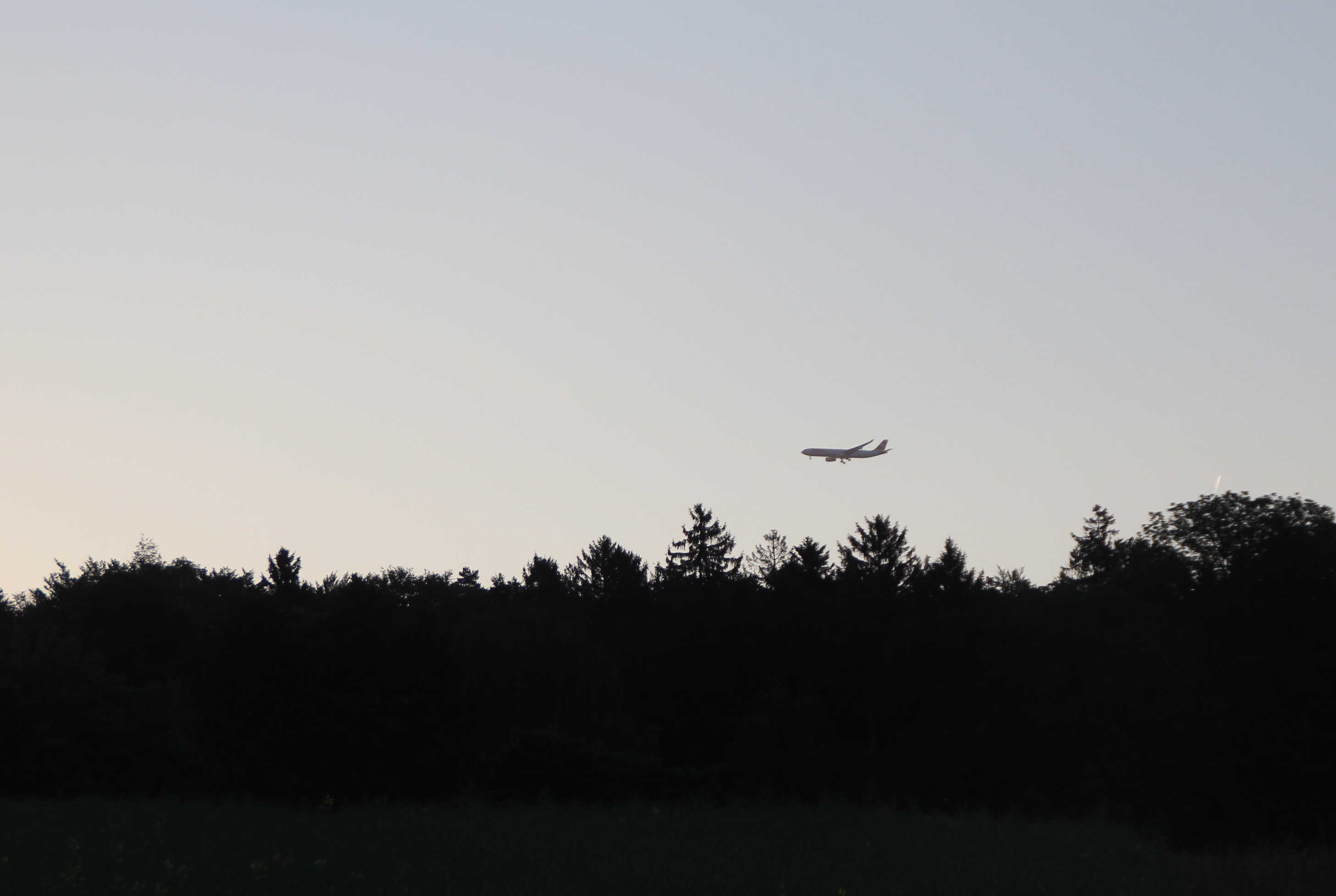 5.50 Uhr: Airbus über dem :de:Zollikerberg im Südanflug auf den Flughafen Zürich